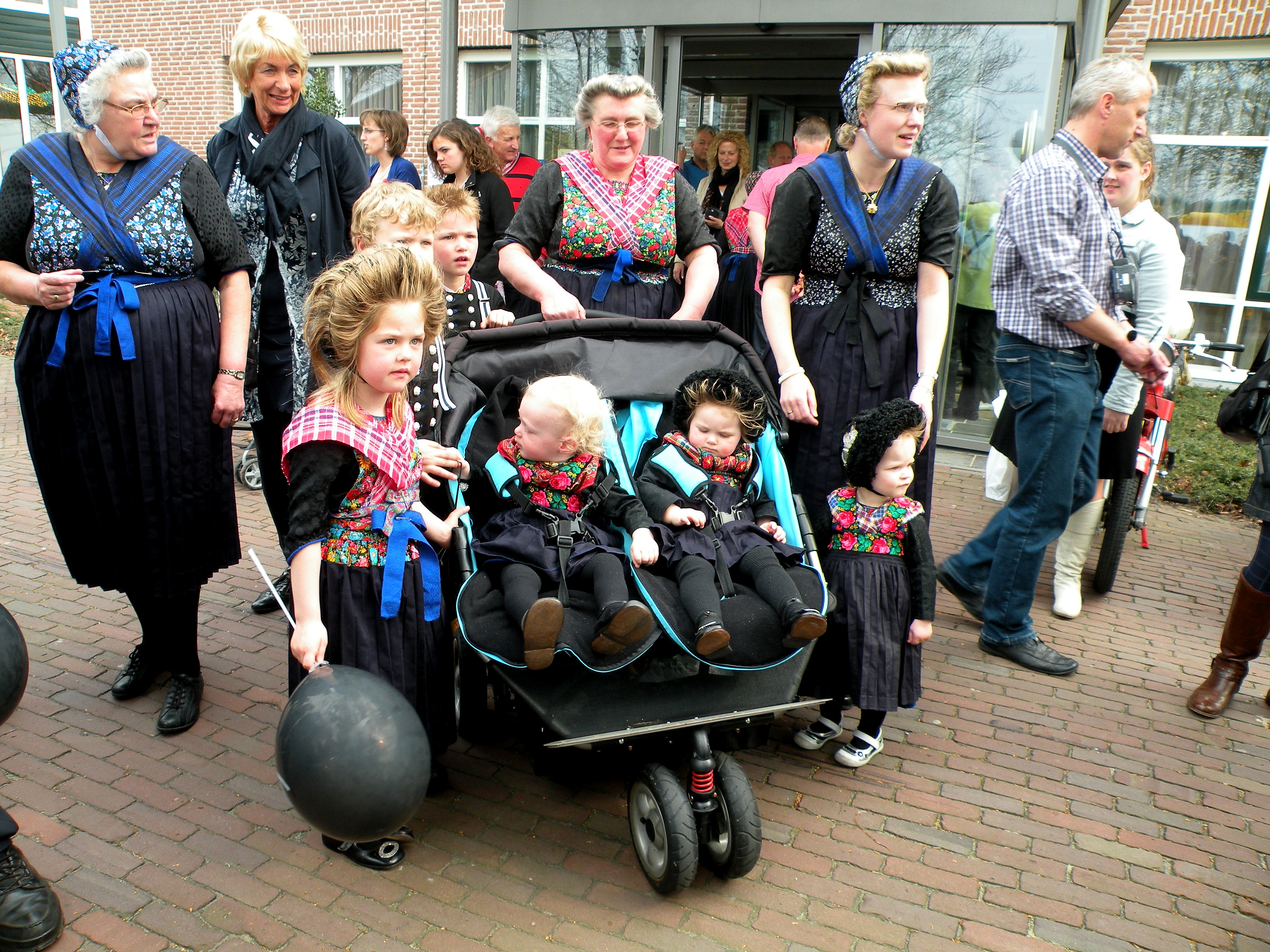 Staphorster klederdracht t.g.v. 200-jarig bestaan gemeente Staphorst 2011. Geposeerd voor het gemeentehuis.